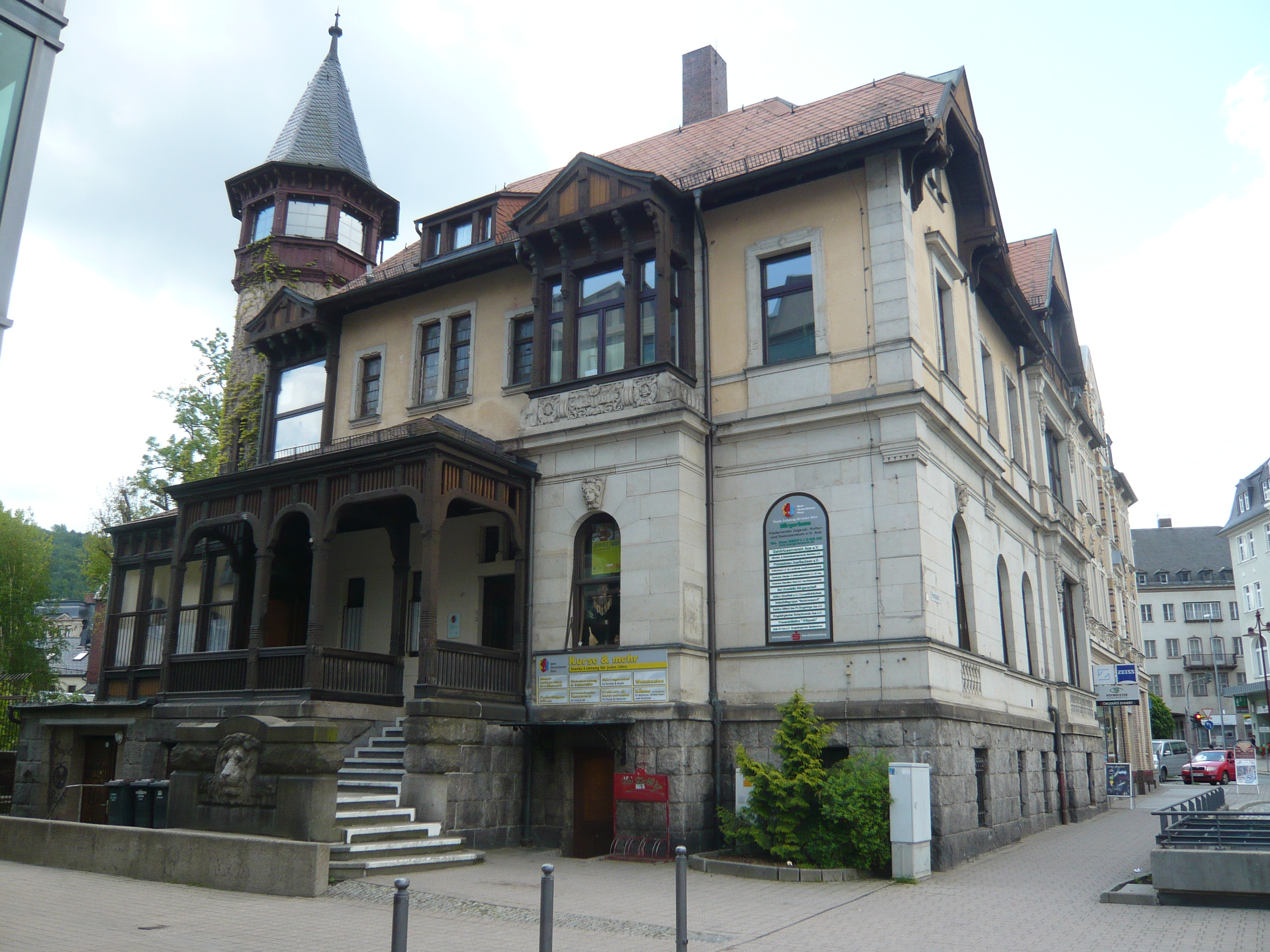 Stadt Aue: Bürgerhaus